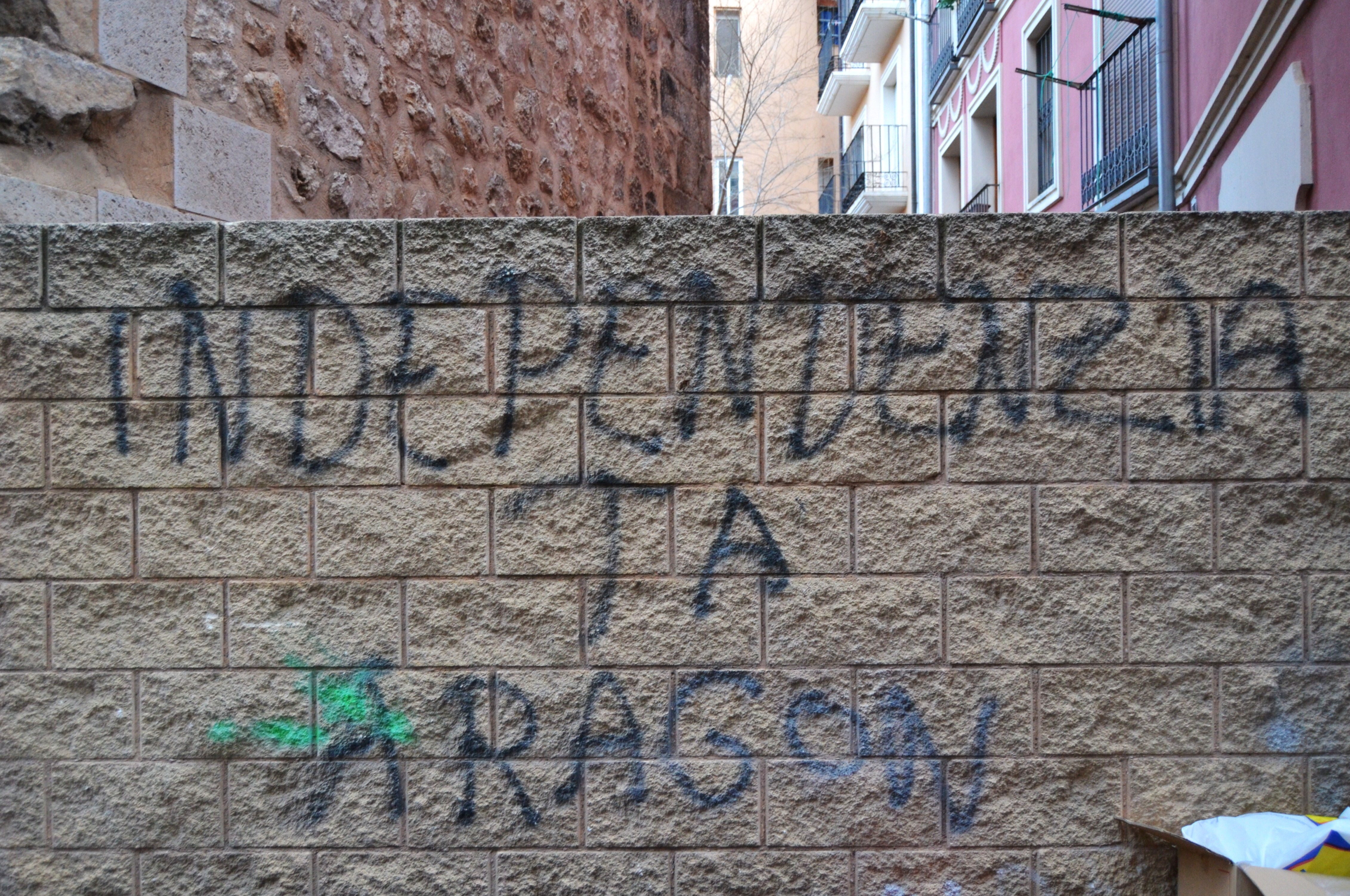 Independenzia ta Aragón, Teruel.